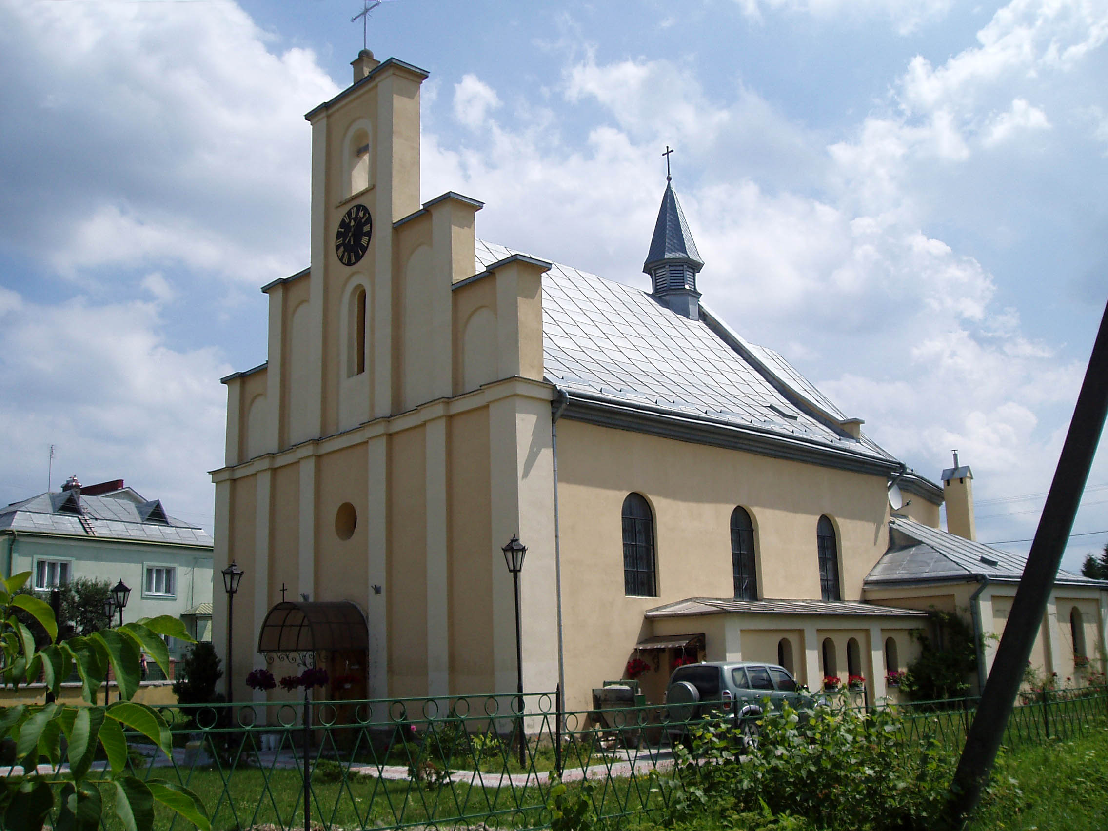 Костел святого Миколая в Миколаєві Львівської області. Збудований у першій третині XVII ст.